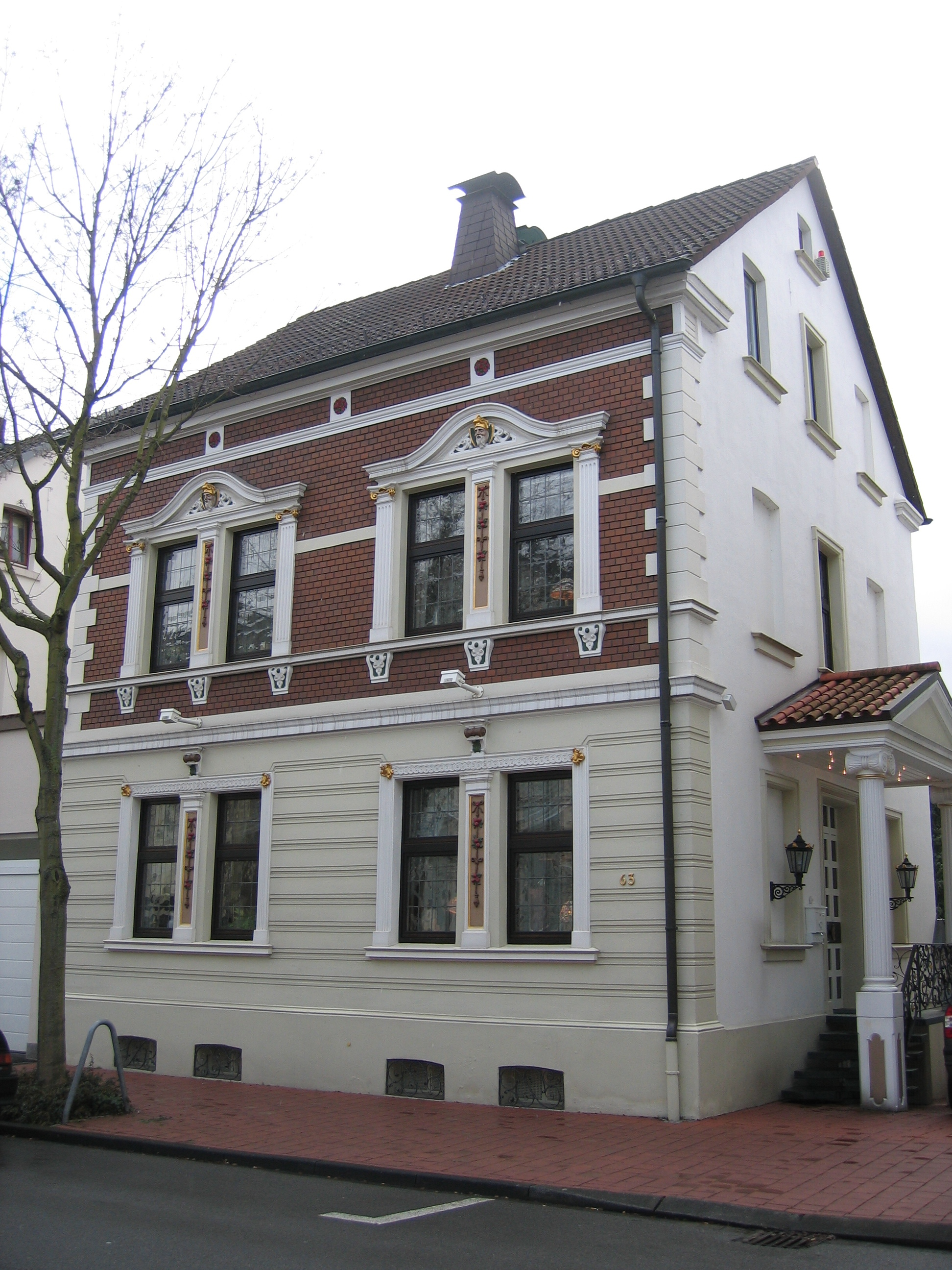 Das Haus von Günter Wewel in Arnsberg